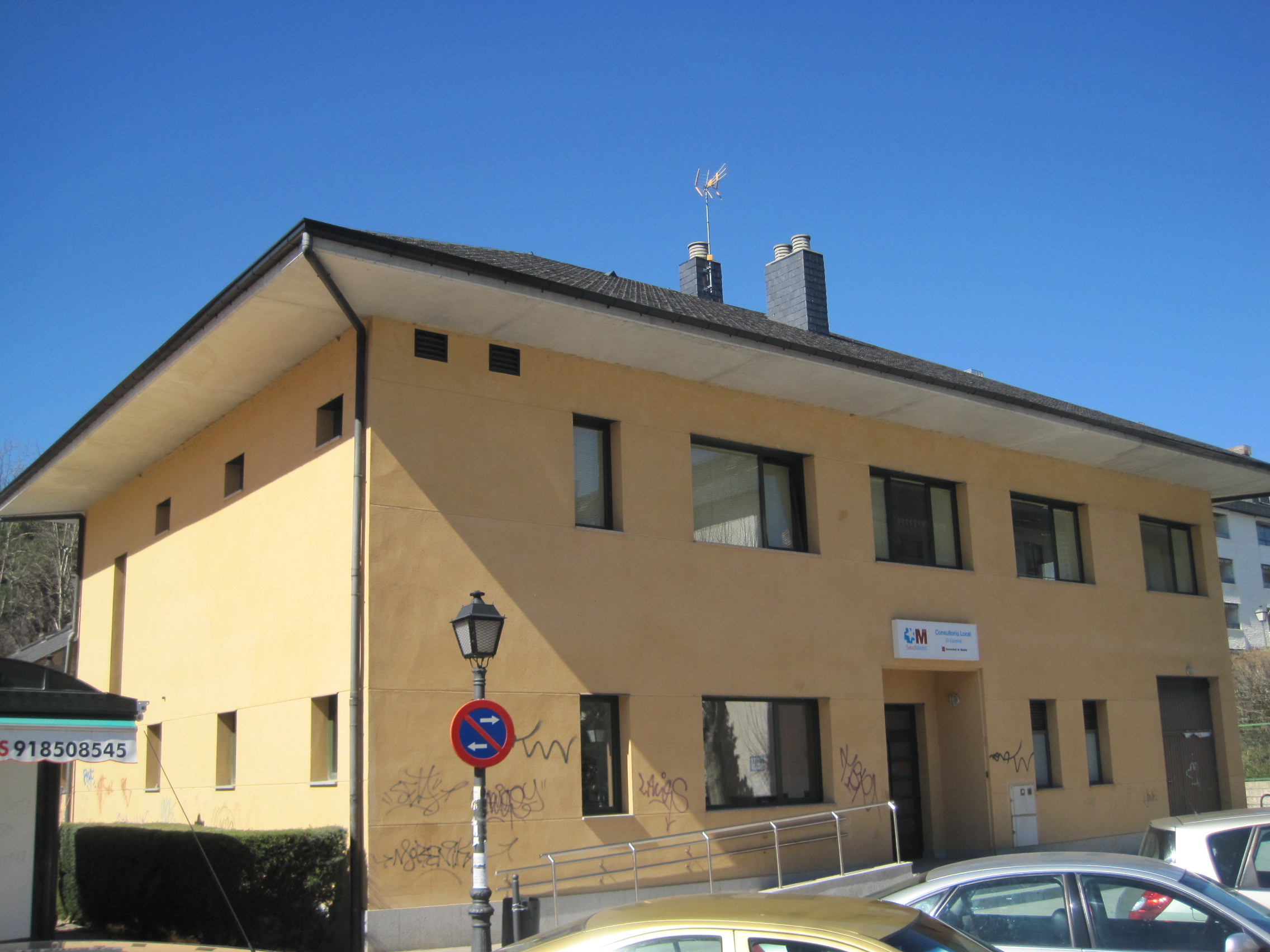 Centro de salud de El Escorial (Madrid, España).